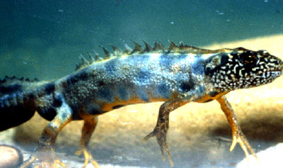 Tritone crestato italico (Tritus carnifex)